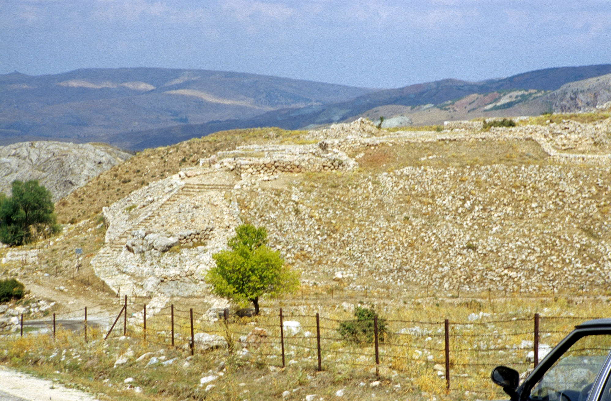 Büyükkale, die Zitadelle der hethitischen Hauptstadt Hattuša bei Boğazkale, Zentraltürkei